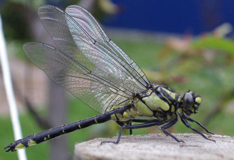 Gadziogłówka pospolita (Gomphus vulgatissimus)